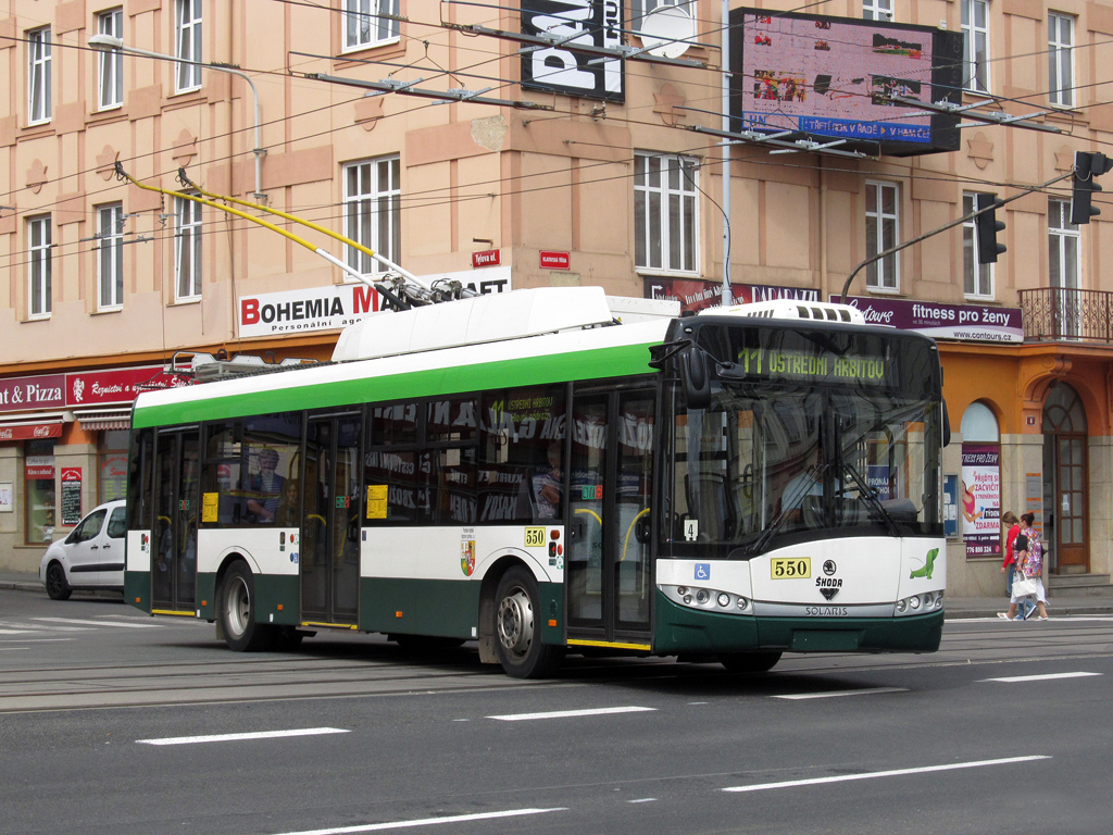 Plzeň trolleybus 550, a Škoda 26Tr Solaris, on Tylova at Klatovská třída, where Tylova becomes Americká street, in service on route 11